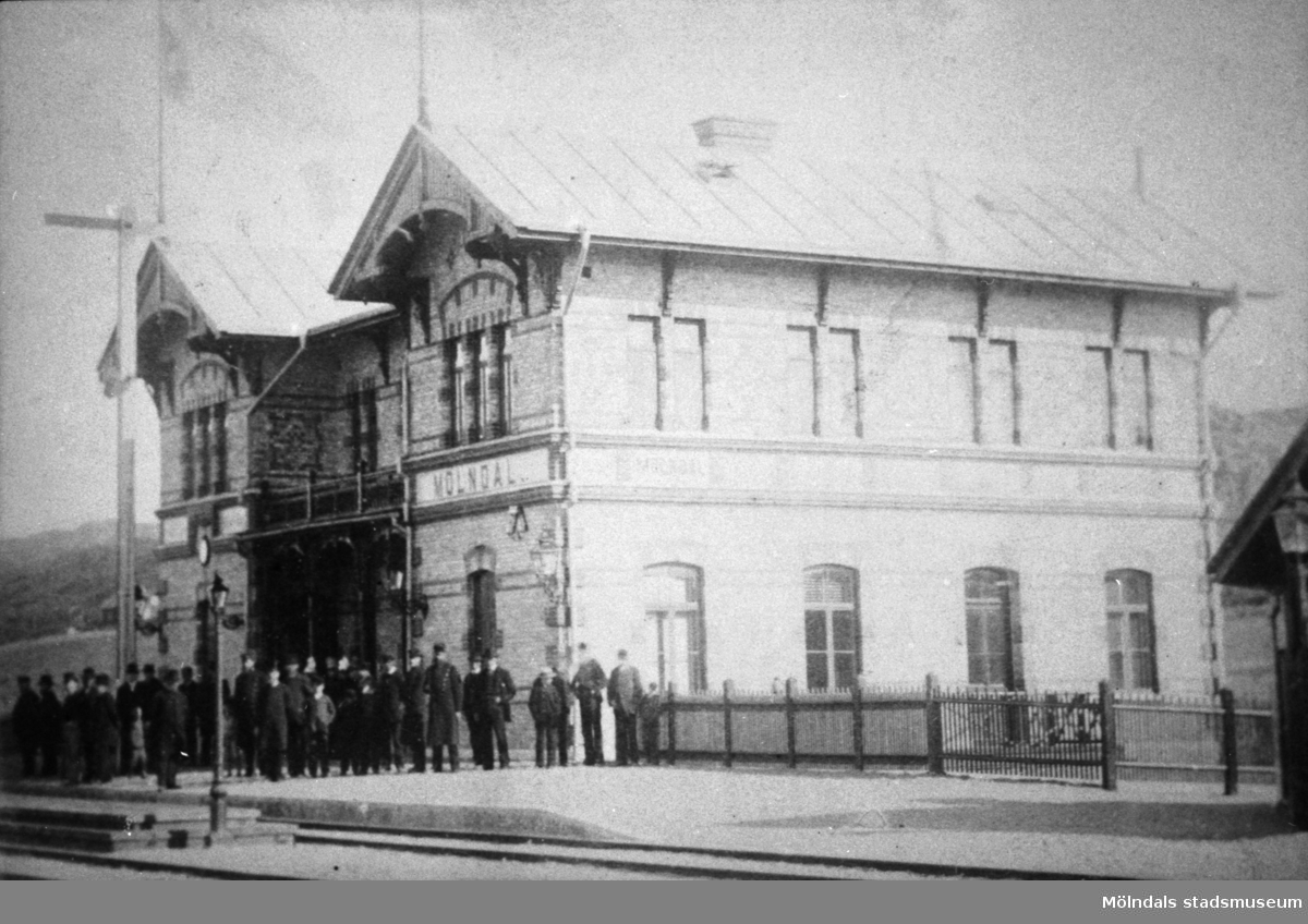 Mölndals Nedre, byggd 1888, riven 1977. Järnvägspersonal samlad framför stationsbyggnaden.